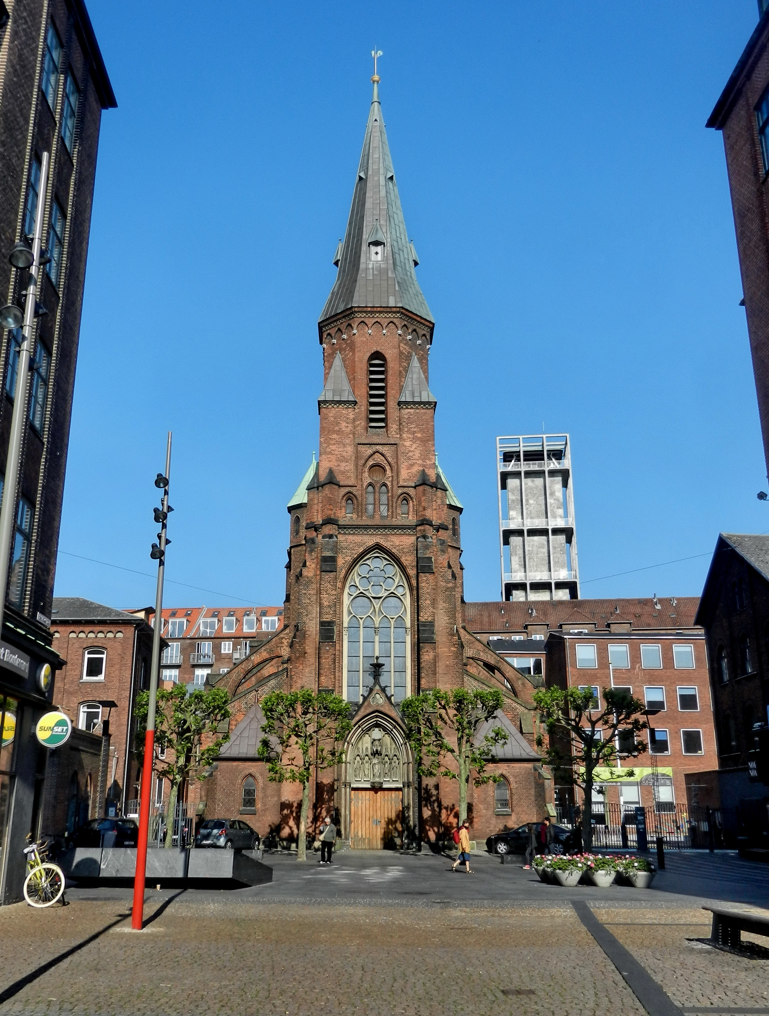 Aarhus